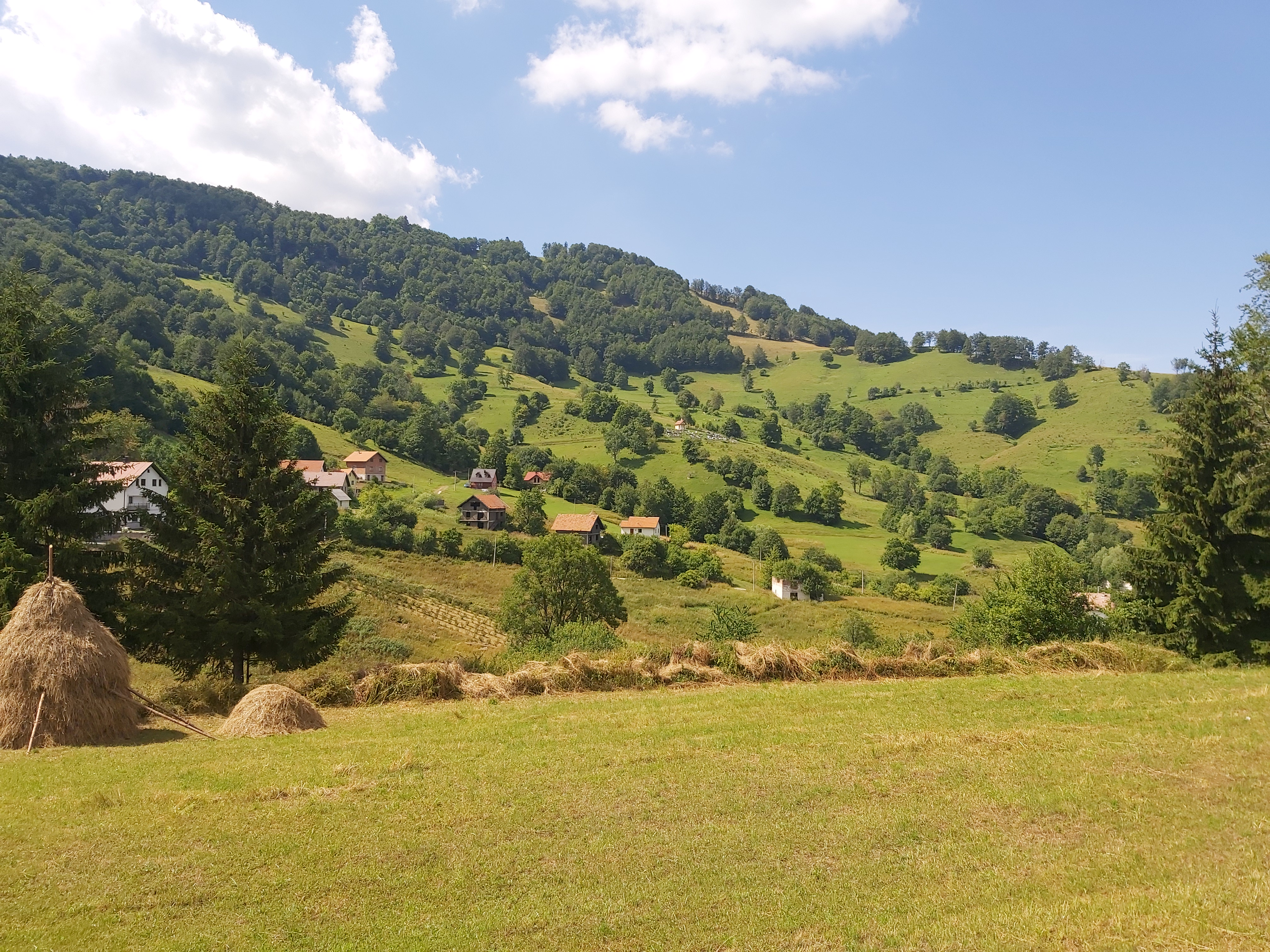 Borovica